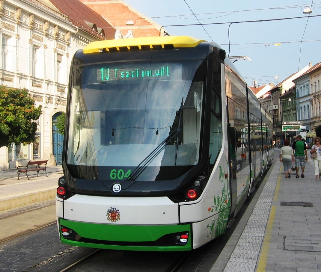 Škoda 26 THu3 villamos Miskolcon